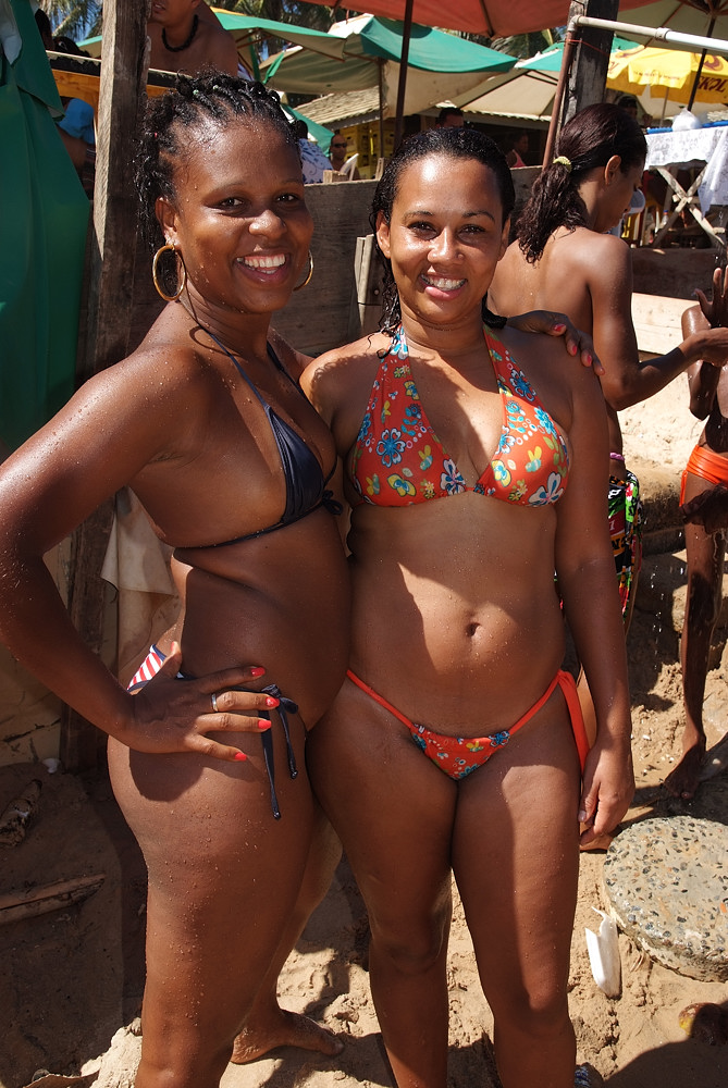 Beach beauties in Salvador, Bahia, Brazil